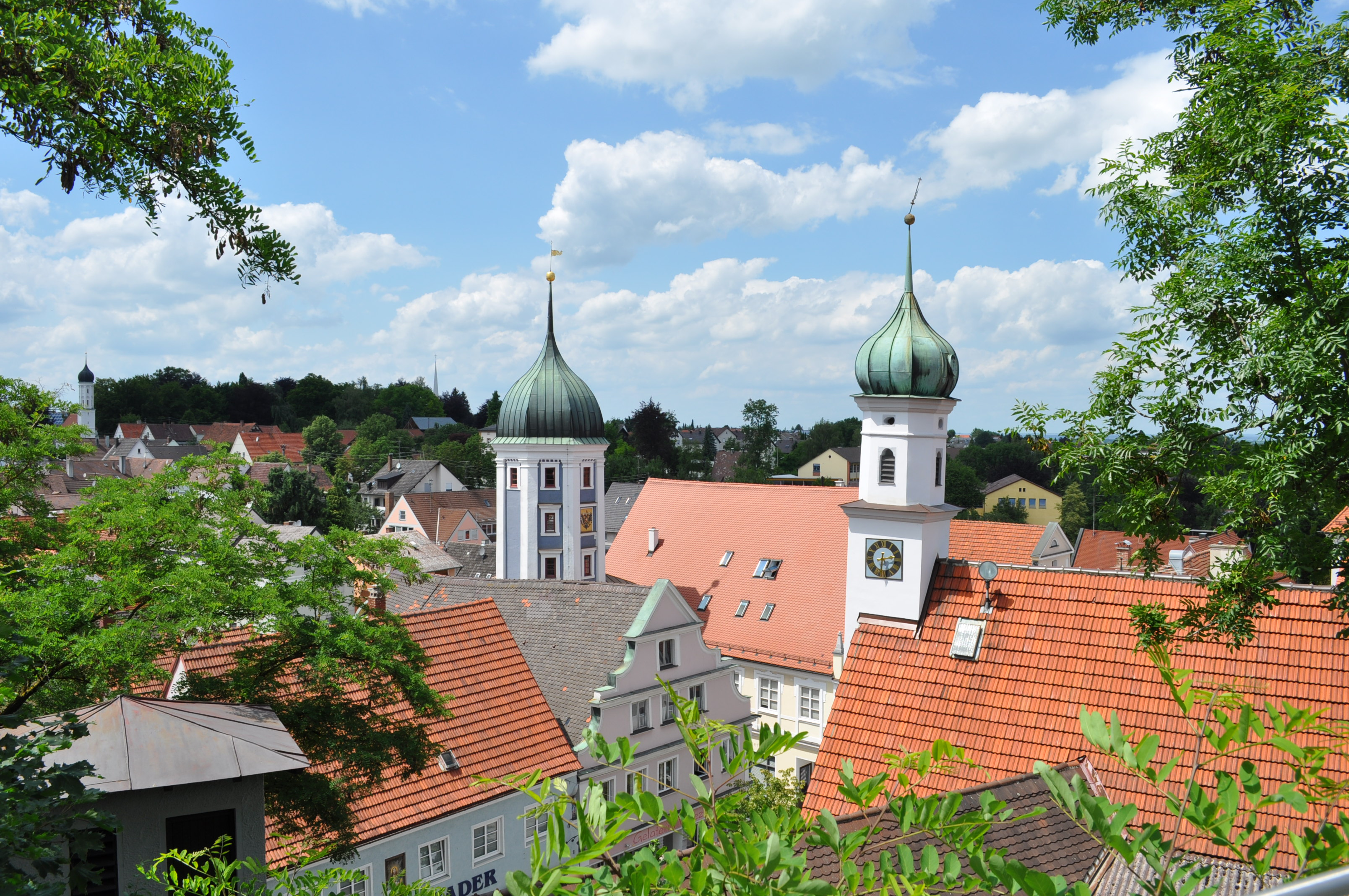 Burgau in Schwaben, Blick auf den Blockhausturm vom Schloss aus